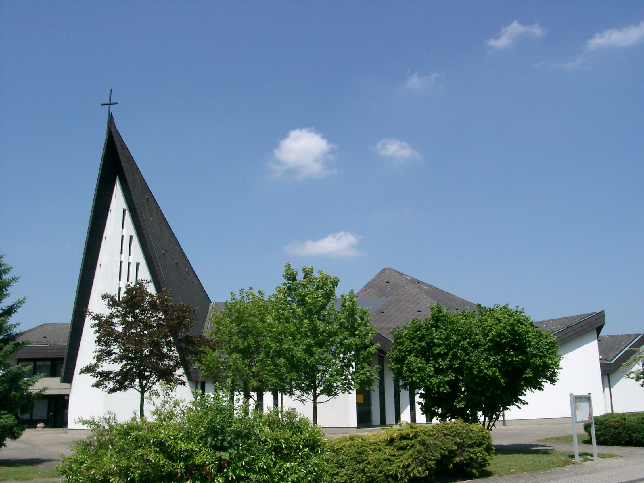 Stutensee, Stadtteil Spöck, Katholische Kirche